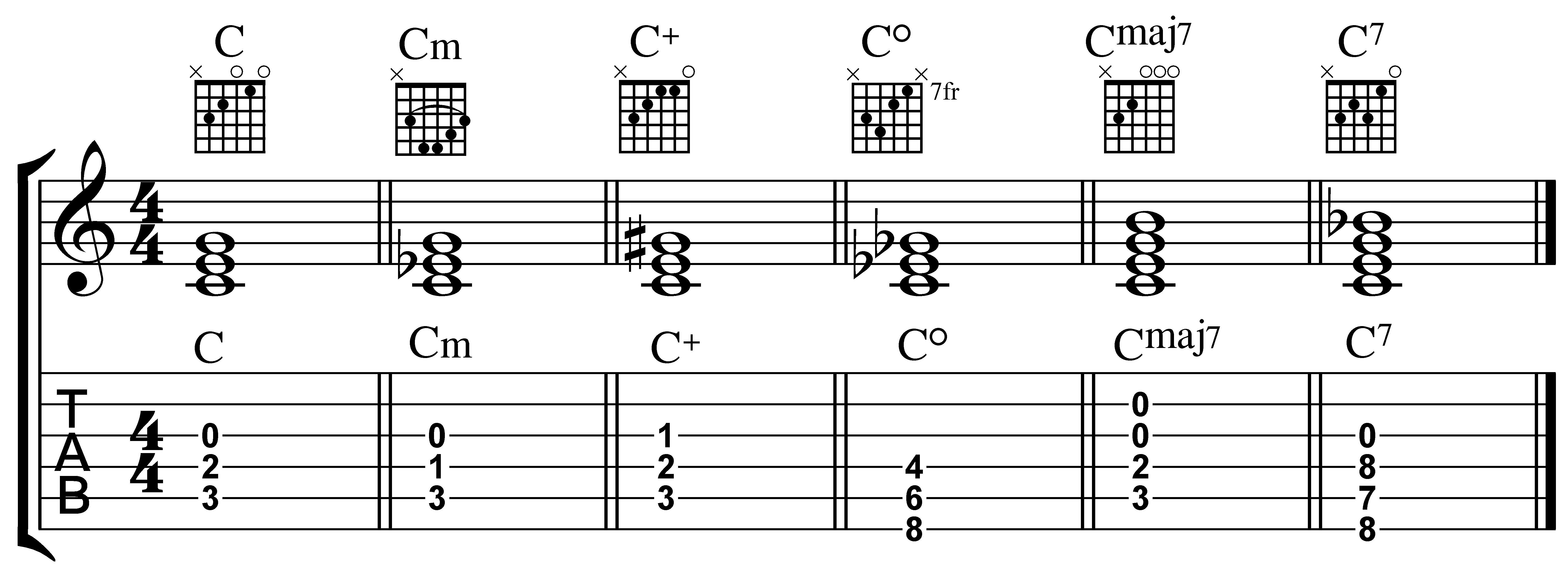 نمونه ای از روش علامت گذاری آکورد روی گیتار